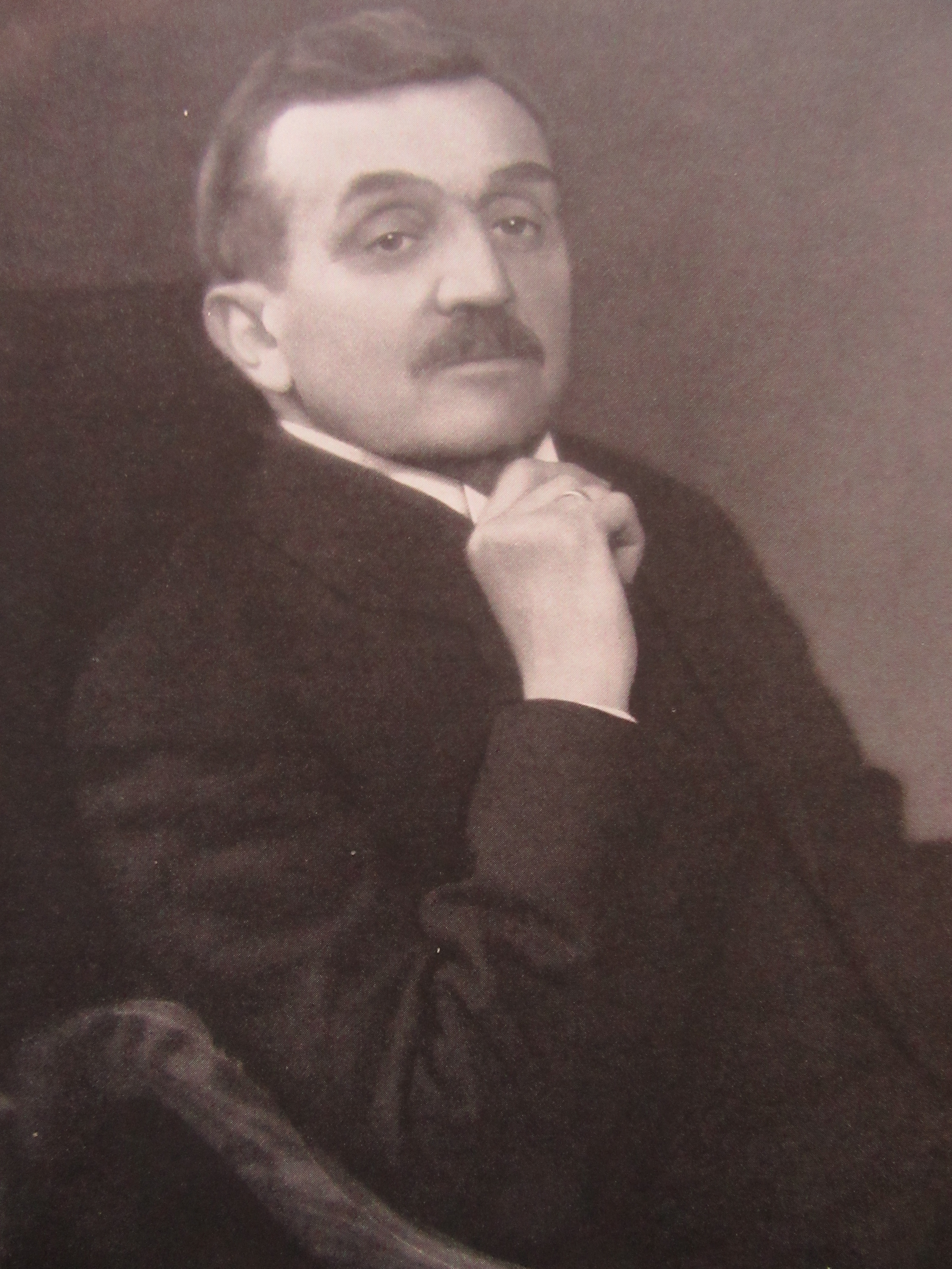 Photo de l'industriel belge